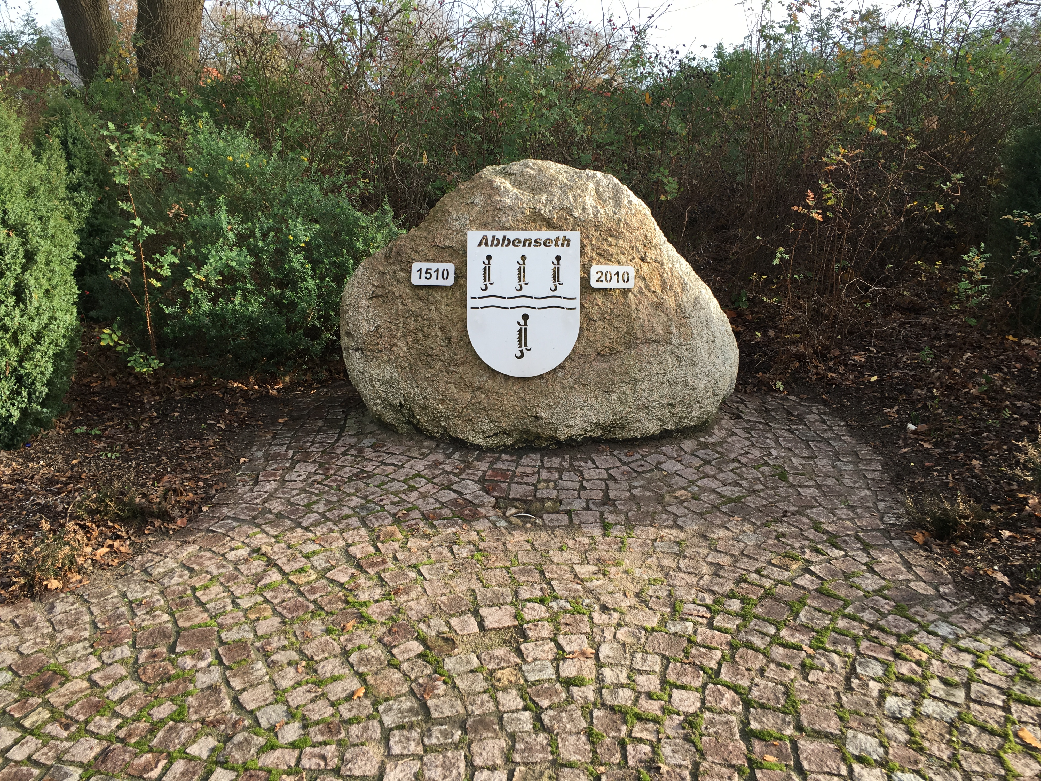 Wapensteen in Abbenseet